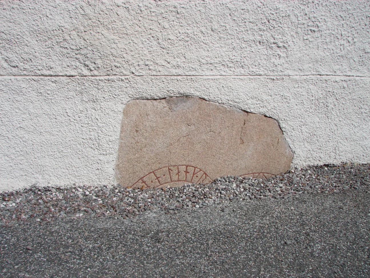 U 133, inmurad i Täby kyrka